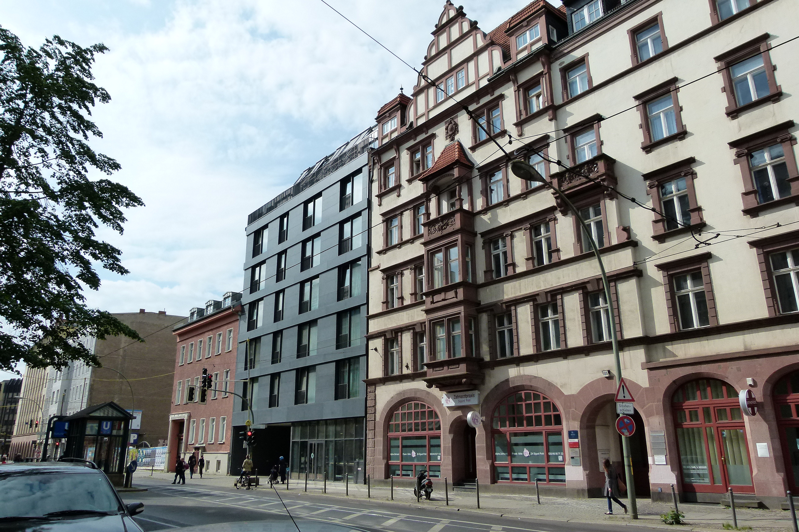 Das ehem. Volkskaffeehaus Chausseestraße Nr. 105 (rechts) und sowie die Nachbarhäuser Nr. 106 und 107